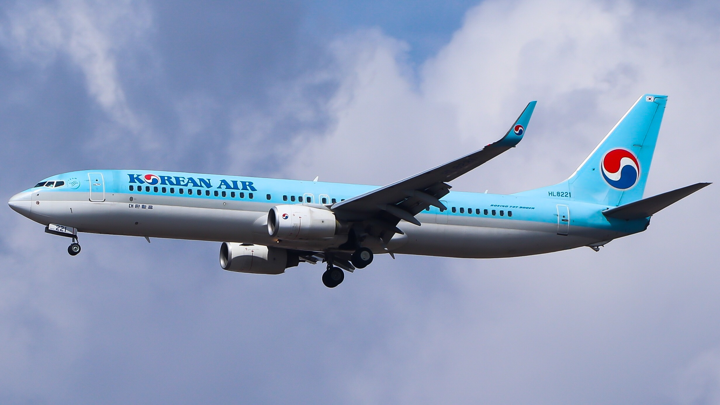 中文（中国大陆）: 大韩航空Hl8221波音737-800ER在牡丹江海浪机场